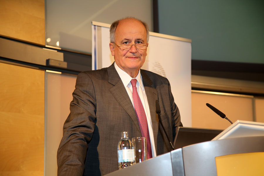 Dr. Karl Sevelda-8936